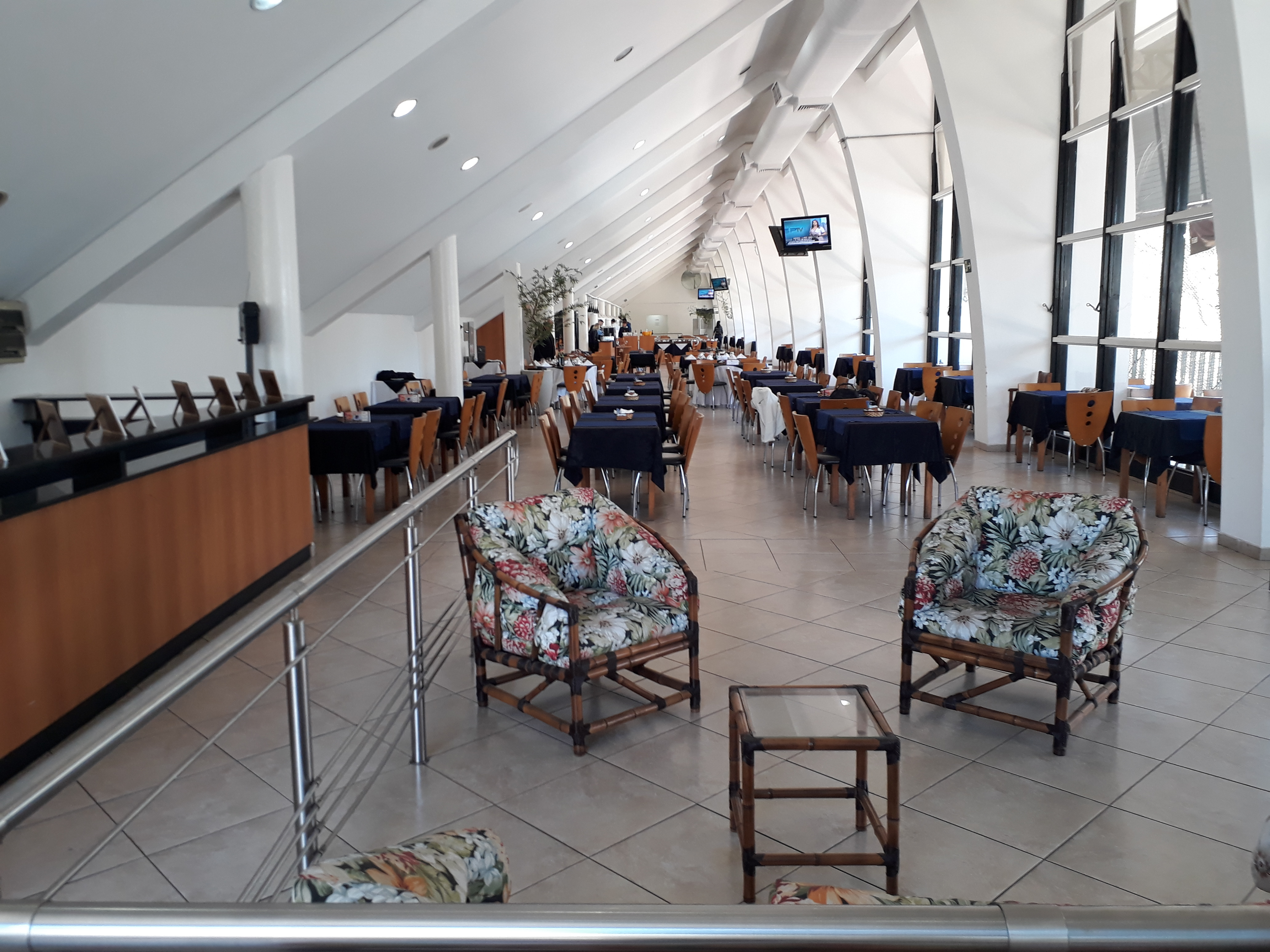 Restaurante do Corinthians, localizado no Parque São Jorge